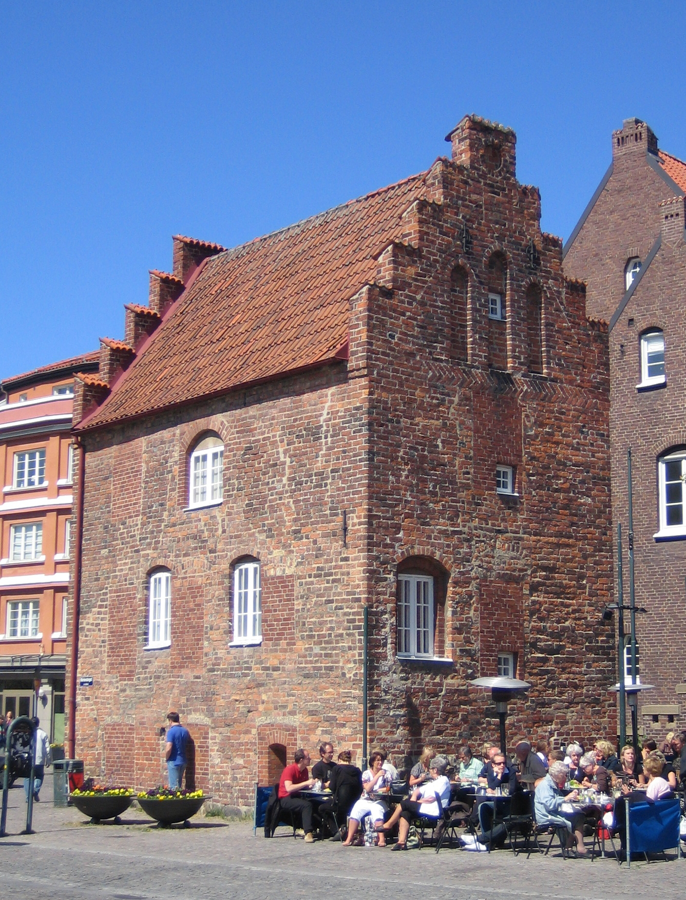 Krognoshuset, medieval building at Mårtenstorget, Lund